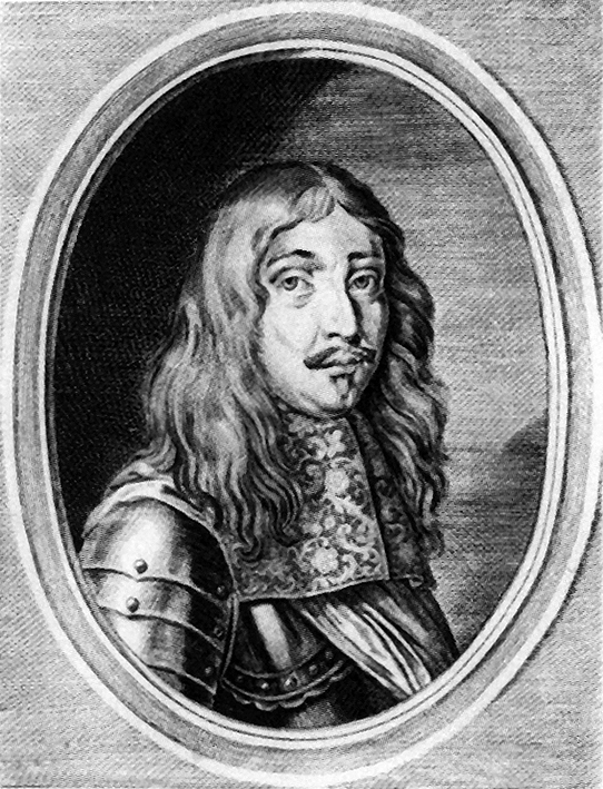 Яків Кеттлер, герцог Курляндії і Семигалії в Лівонії. Гравюра (24,4 x 16 см; аркуш: 24,6 x 16,9 см.). Ga. Gualdo Priorato. Historia di Leopoldo Cesare. Vienna, 1670-1674